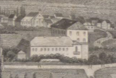 Oranienhof (vorne quadratischer Altbau, dahinter Neubau) und Gymnasium (im Hintergrund) in Kreuznach, Blick von Süden (Ausschnitt), vor 1838